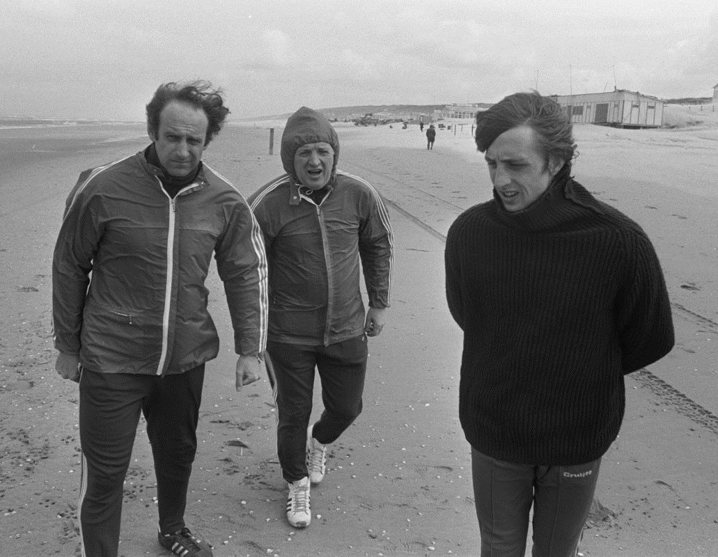 Ajax in Wassenaar als voorbereiding op de Europacup I finale tegen Inter Milaan. v.l.n.r. Han Grijzenhout, Stefan Kovacs en Johan Cruijff.